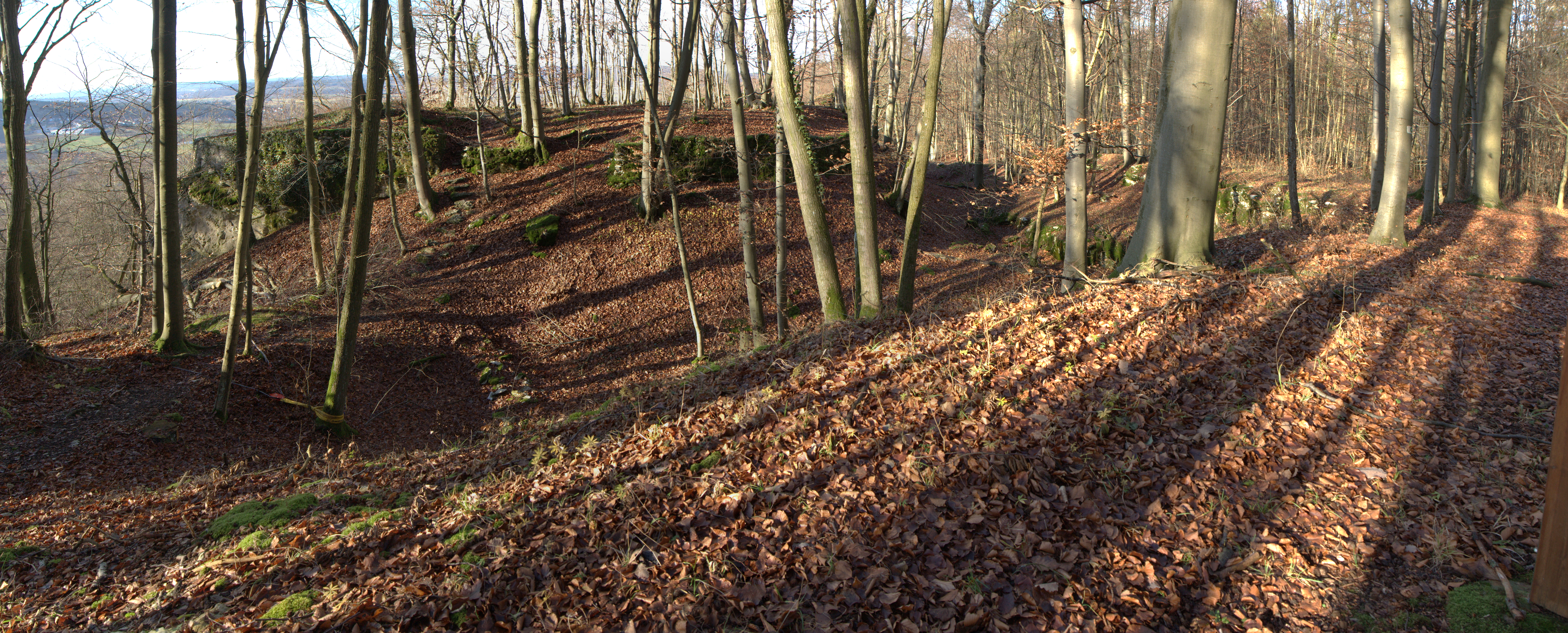 Burgstall Dietrichstein - Ansicht des Burgstalles aus nordöstlicher Richtung